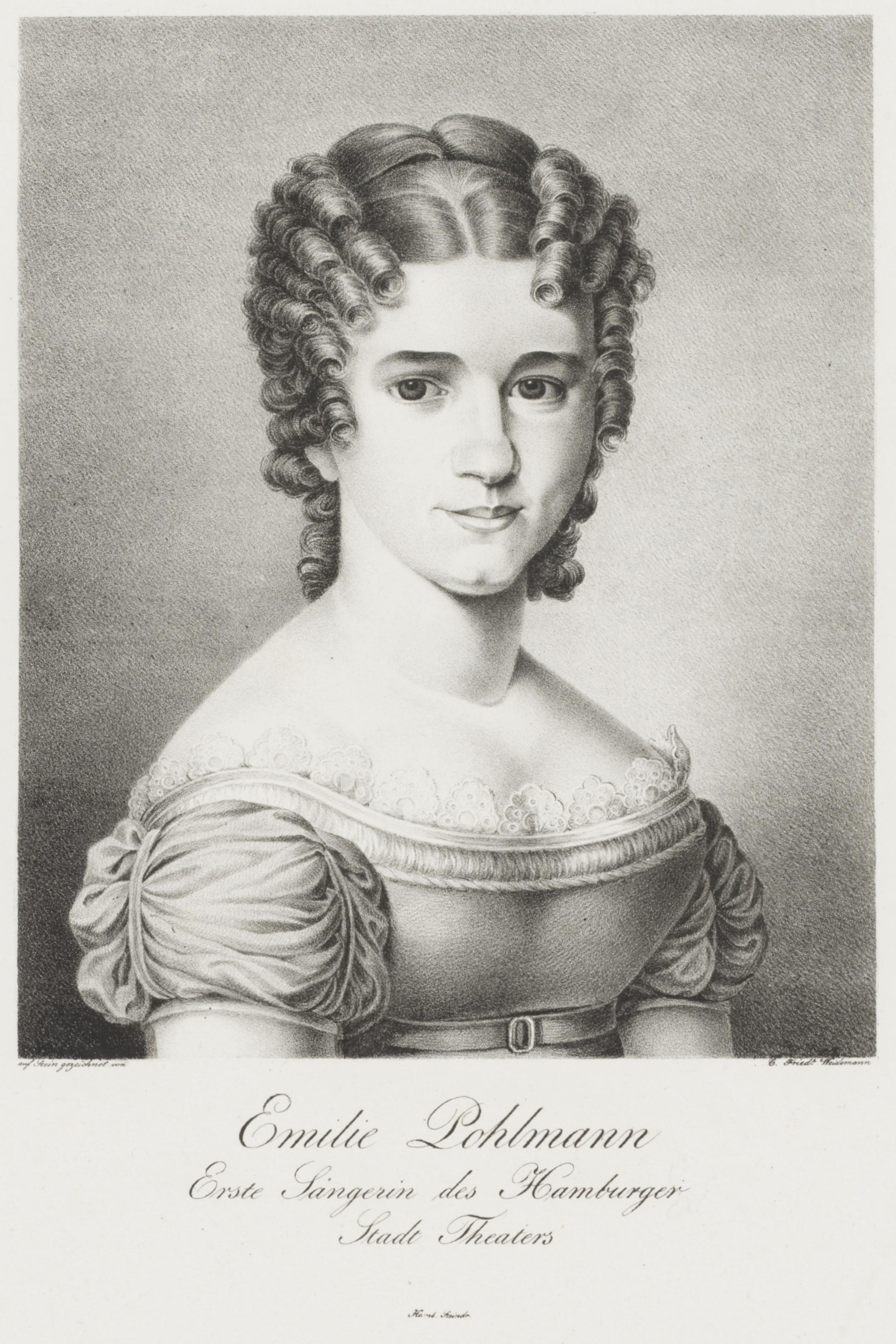 Emilie Pohlmann (* um 1800; † 27. oder 28. Juli 1875), deutsche Opernsängerin